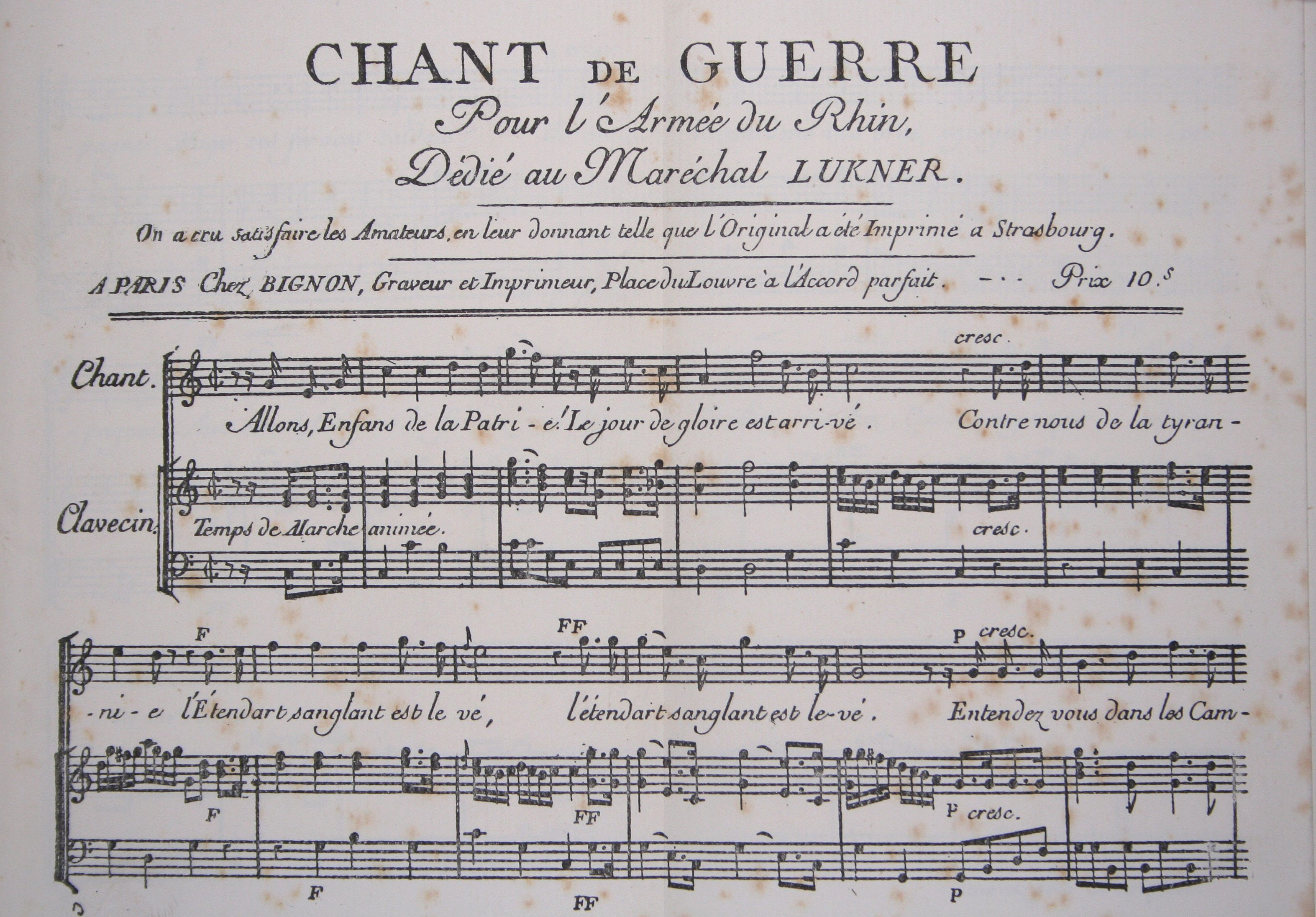 partition marseillaises (premières mesures)